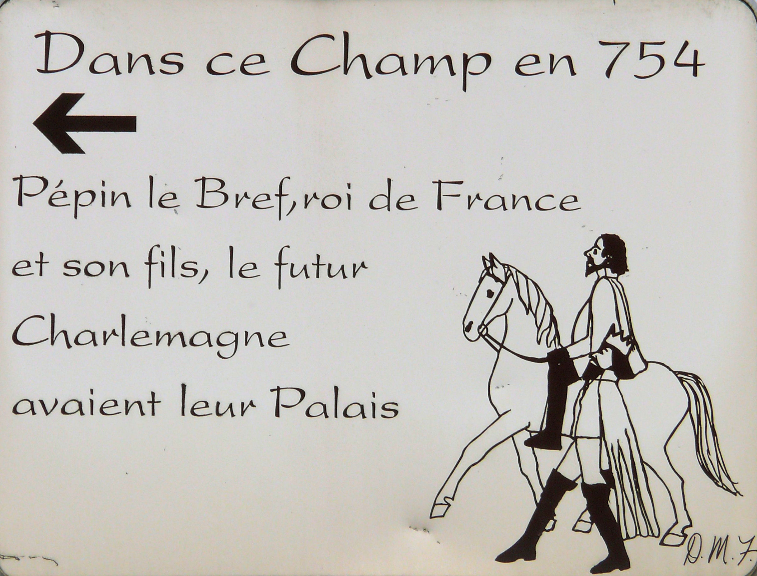 Ponthion - Panneau d'information sur le palais de Pépin le Bref